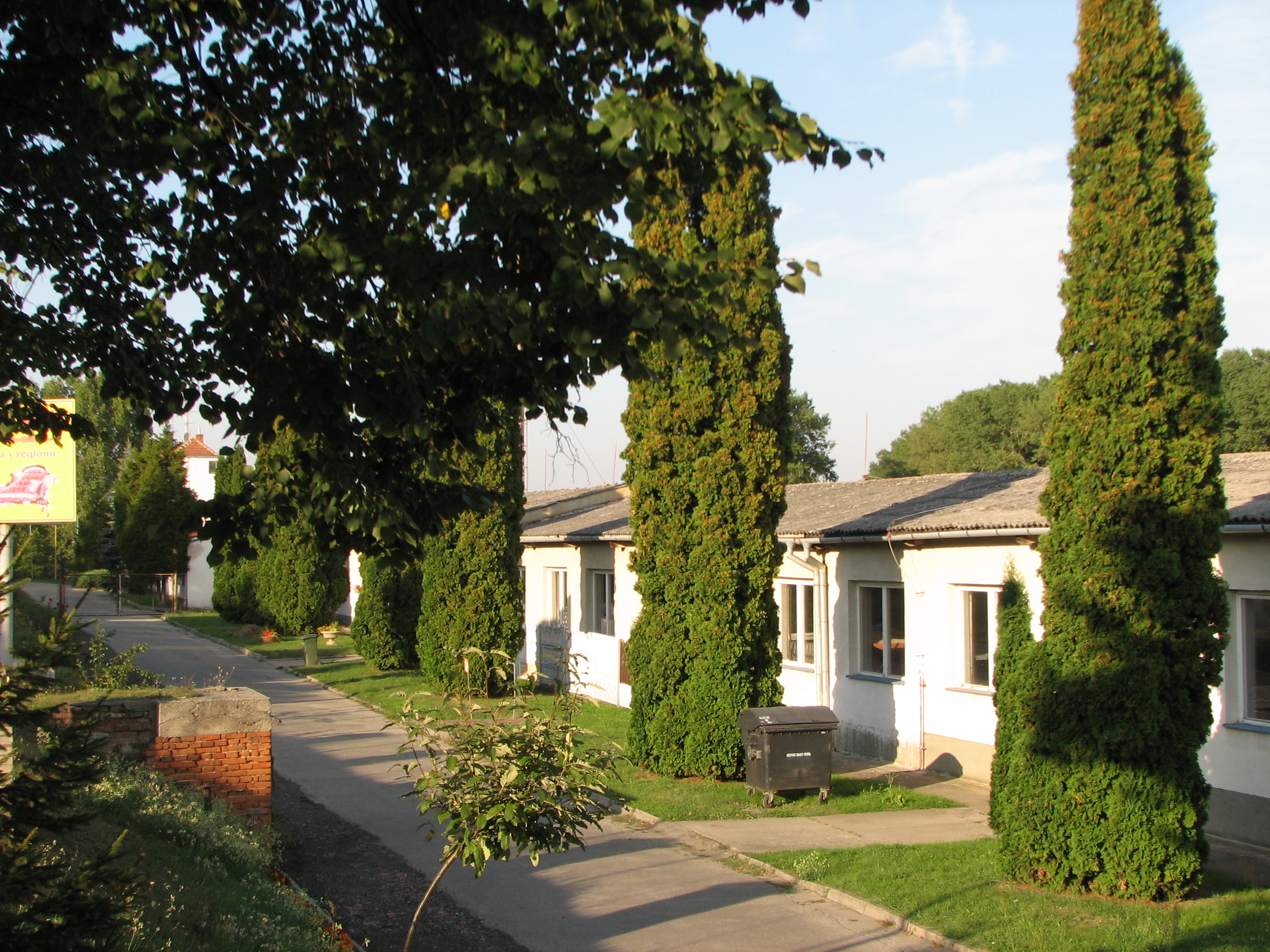 Svatobořice - bývalý internanční tábor z druhé světové války